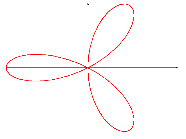 Krzywa trifolium (matematyka)